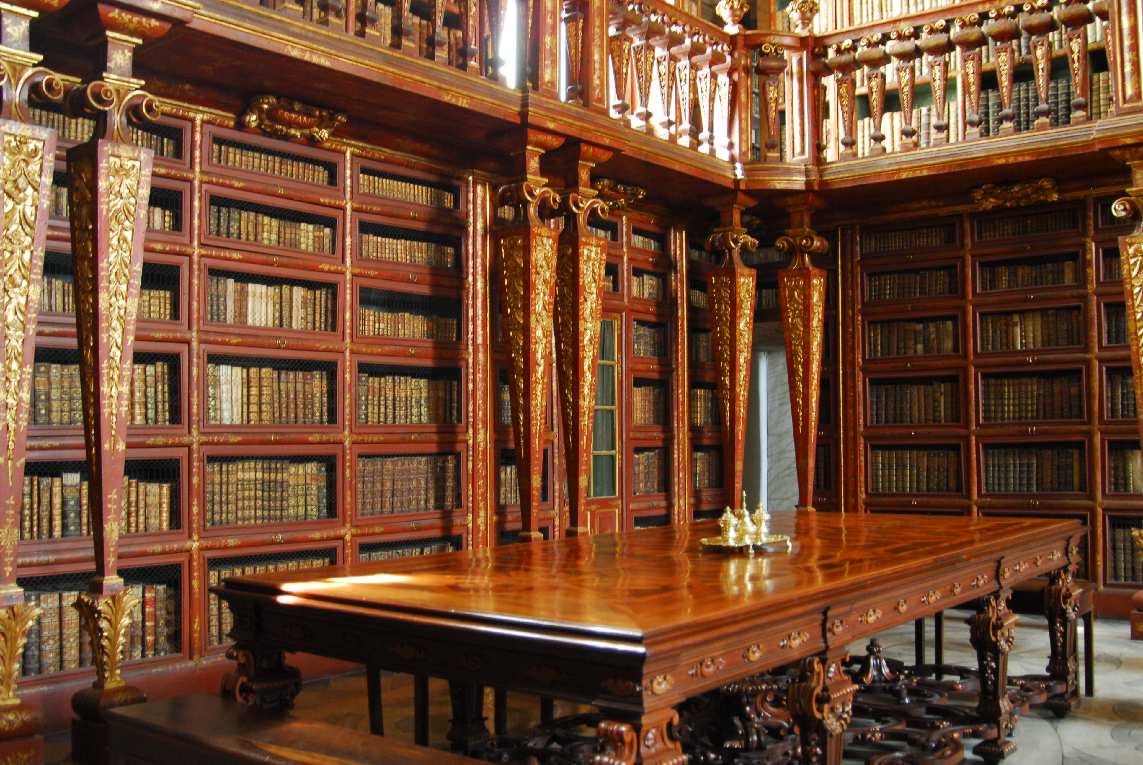 Biblioteca Joanina em CoimbraCoimbra.